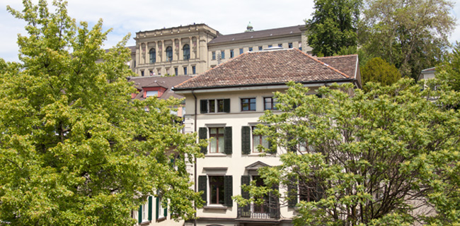 Corporate Foto (Slider Website)